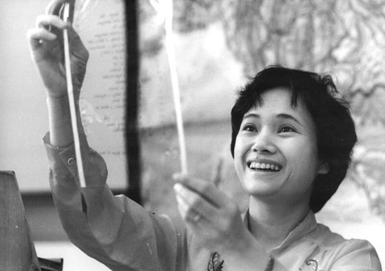 Dresden, Doktorandin aus Vietnam ADN-ZB Deutsche Demokratische Republik 29.1.1986 Doktorareit erfolgreich verteidigt (2 Motive). Als Doktor der Pädagogik promovierte am 15.1.1986 Nguyen Thi Phuong aus der Sozialistischen Republik Vietnam an der Pädagogischen Hochschule in Dresden. Ihre künftige Arbeitsstelle ist der Schulbuchverlag in Hanoi. -siehe auch 1986-0115-12 N- Reporter: Hiekel Copyright: ADN-Zentralbild Berlin-DDR